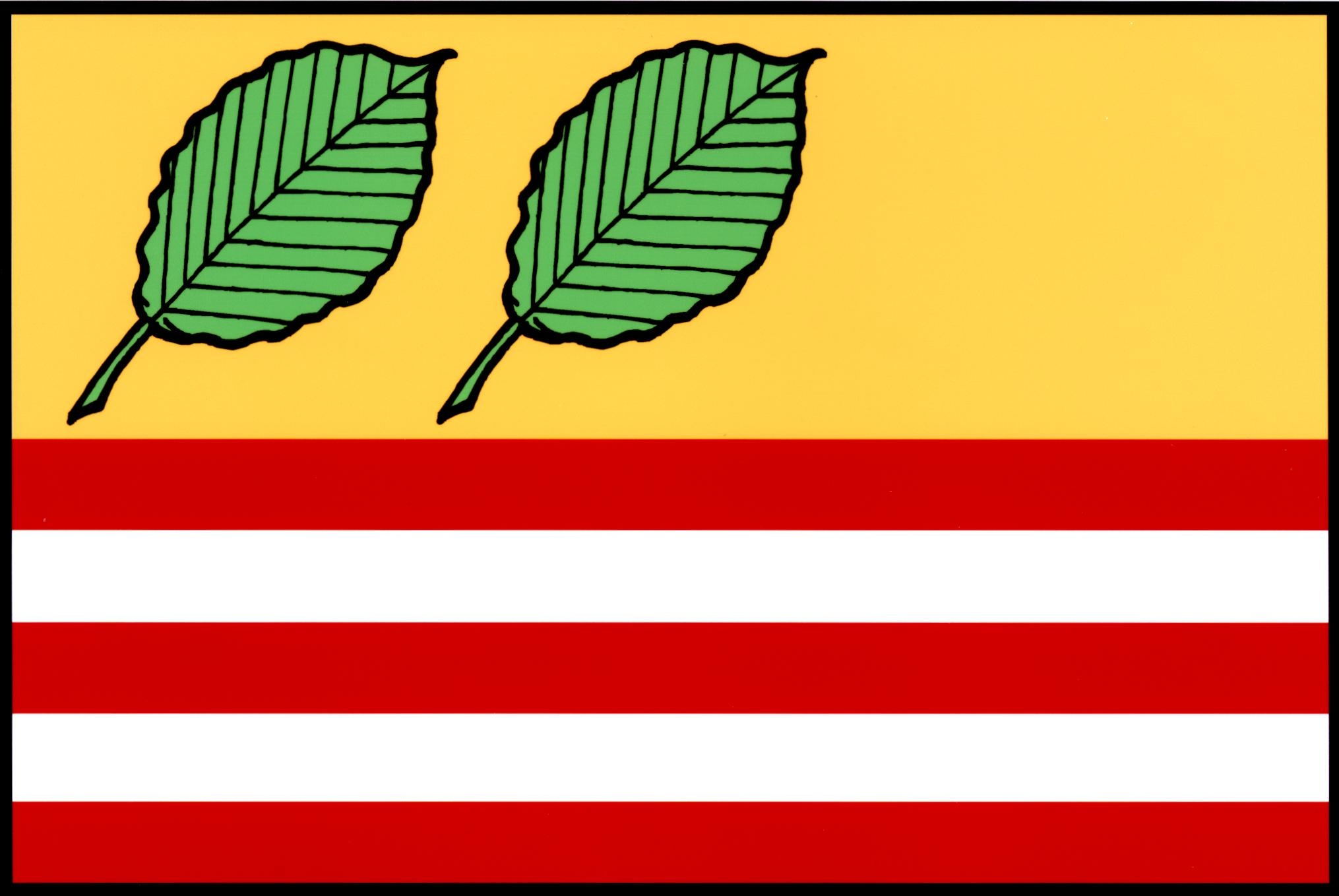 Vlajka obce Horní Bukovina